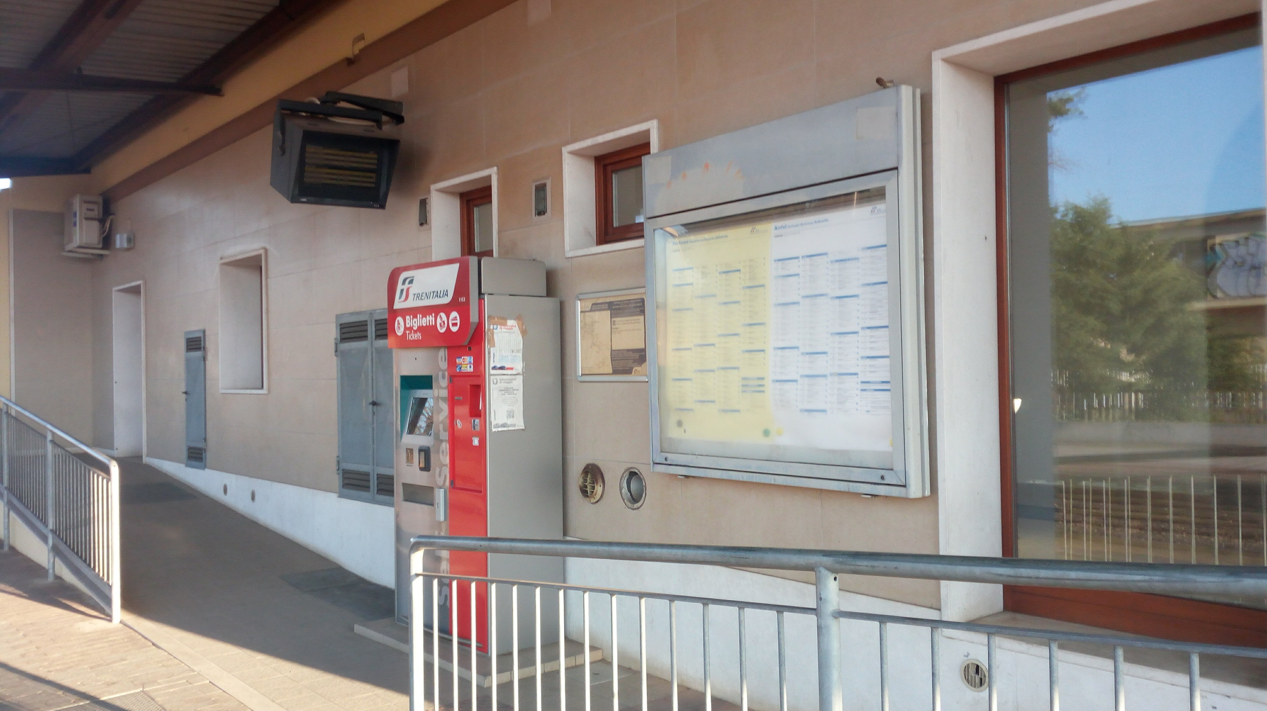 Biglietteria self-service e tabelloni degli orari presso il fabbricato viaggiatori della stazione di Assemini.